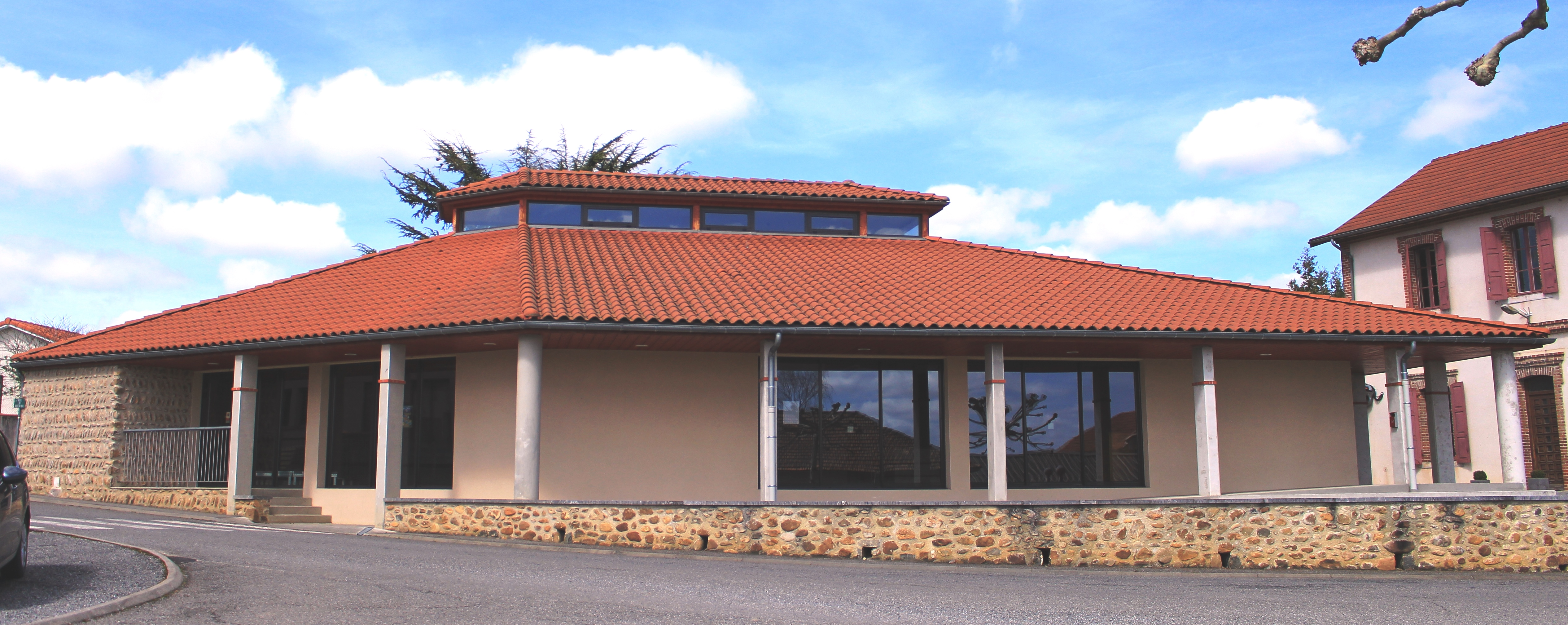 Salle des fêtes de Clarens (Hautes-Pyrénées)